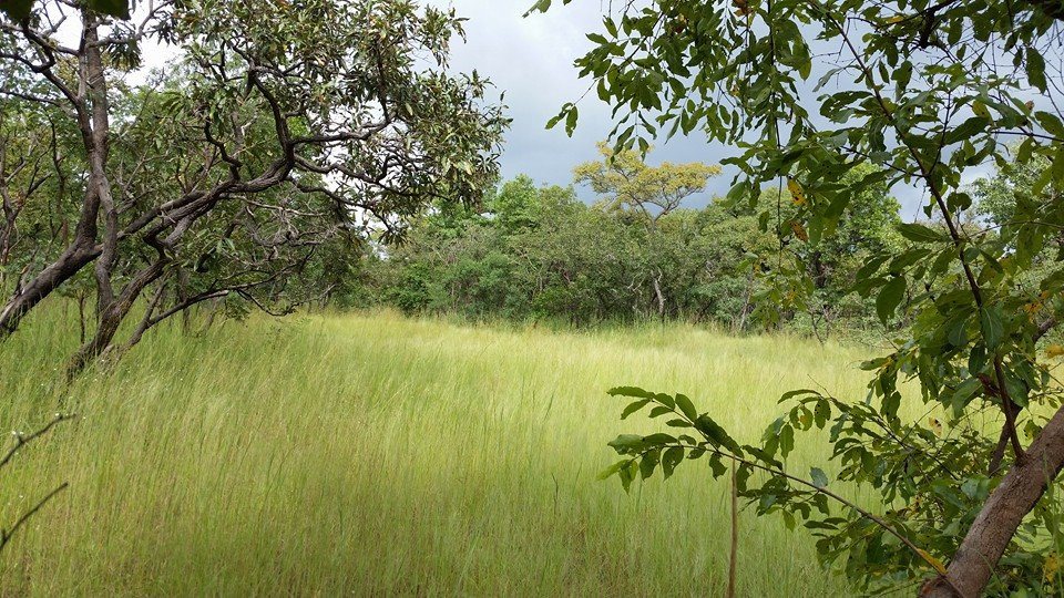 הפארק הלאומי קומואה בחוף השנהב בדרך לגאואי מרכז השמורה על גדות הנחל קומואה